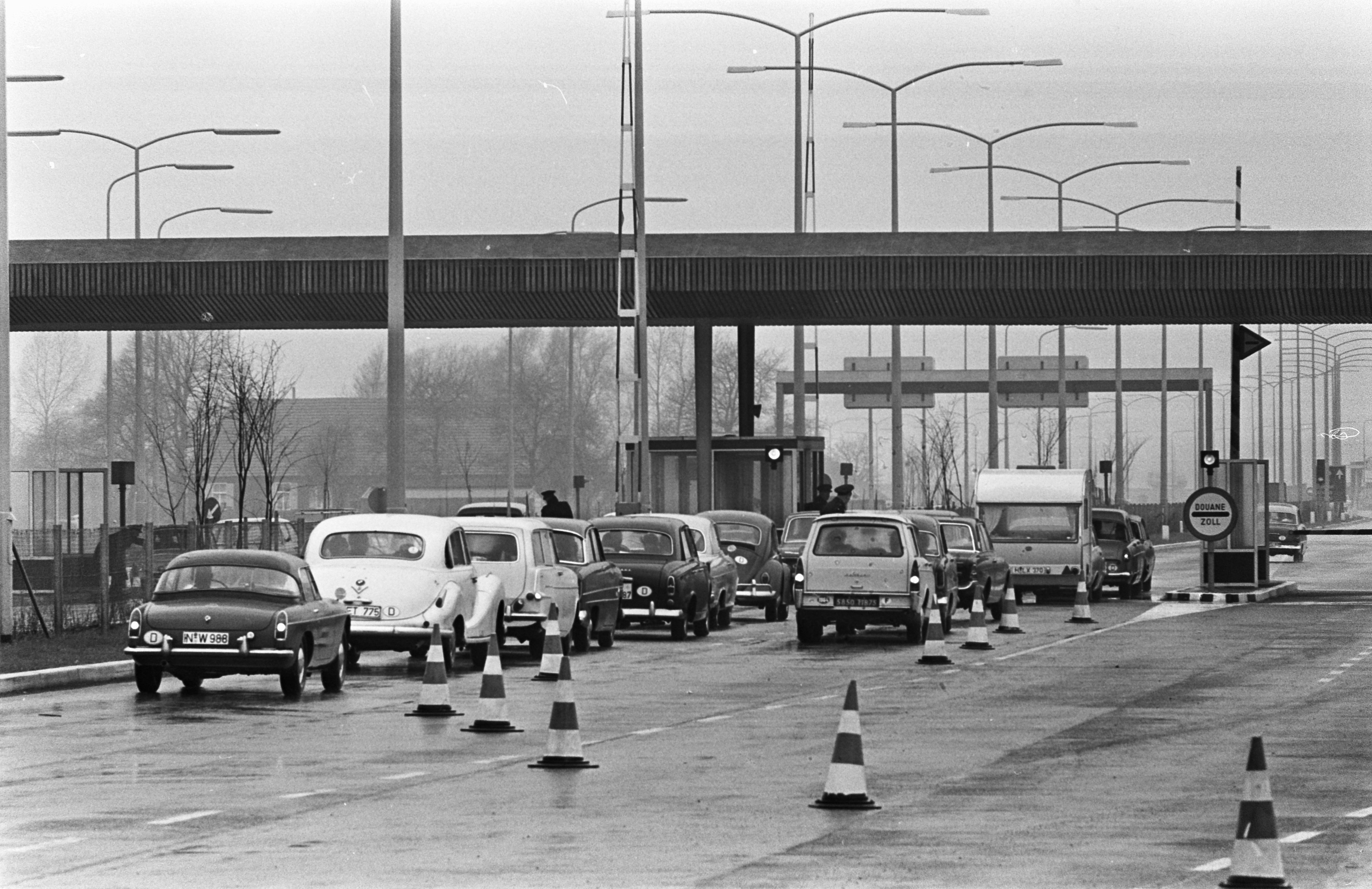 Collectie / Archief : Fotocollectie Anefo Reportage / Serie : [ onbekend ] Beschrijving : Duitse invasie begonnen, drukte bij de grenspost Bergh Datum : 15 april 1965 Locatie : Bergh Trefwoorden : auto's, grenzen, vakanties, verkeer Fotograaf : Evers, Joost / Anefo Auteursrechthebbende : Nationaal Archief Materiaalsoort : Negatief (zwart/wit) Nummer archiefinventaris : bekijk toegang 2.24.01.05 Bestanddeelnummer : 917-6549